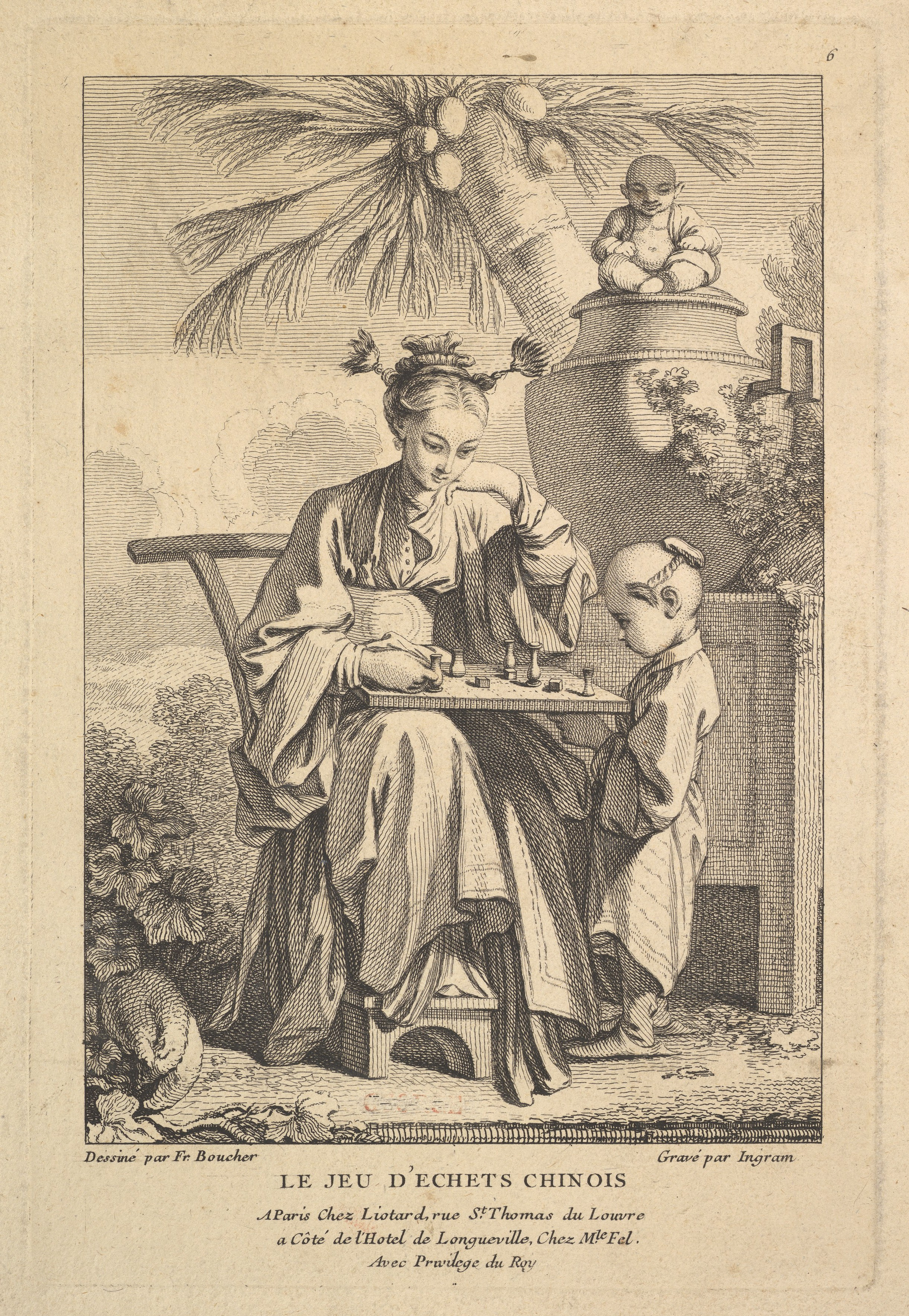 Le jeu d'echets chinois Artist:John Ingram (British, London 1721 active to 1763) Artist: After François Boucher (French, Paris 1703–1770 Paris) Date:1741–63 Medium:Etching and Engraving Dimensions:sheet: 15 1/2 x 10 7/8 in. (39.4 x 27.7 cm) plate: 9 5/8 x 6 7/16 in. (24.5 x 16.4 cm) Classification:Prints Credit Line:The Elisha Whittelsey Collection, The Elisha Whittelsey Fund, 1966 Accession Number:66.628.4(1)